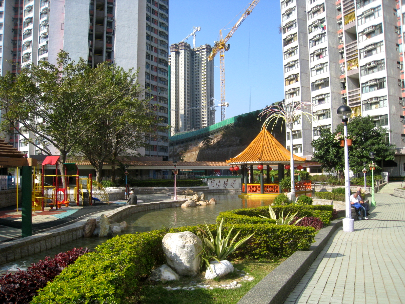 Choi Ha Estate Landscape Area